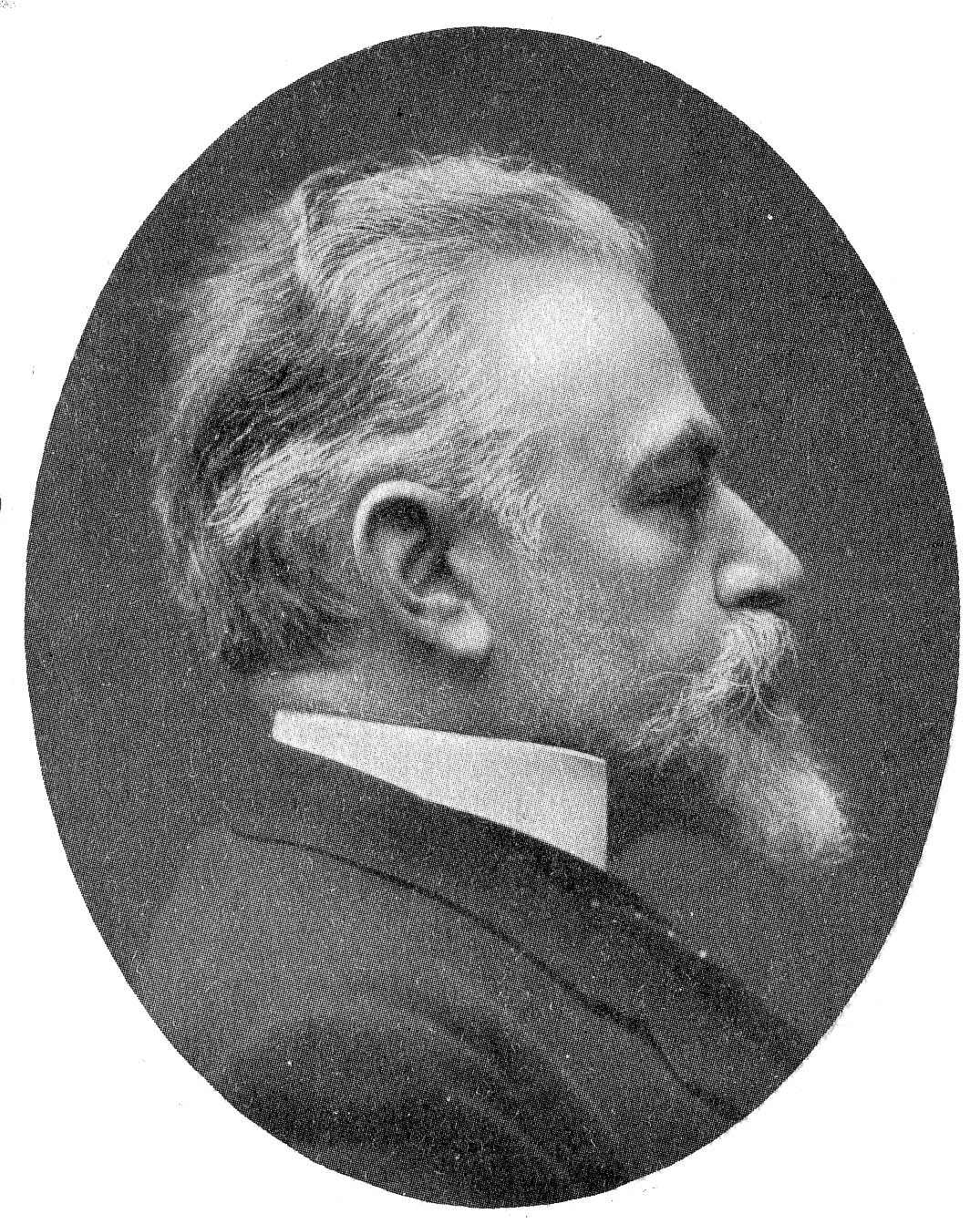 Knut Wallenberg. Bankman, politiker och utrikesminister.